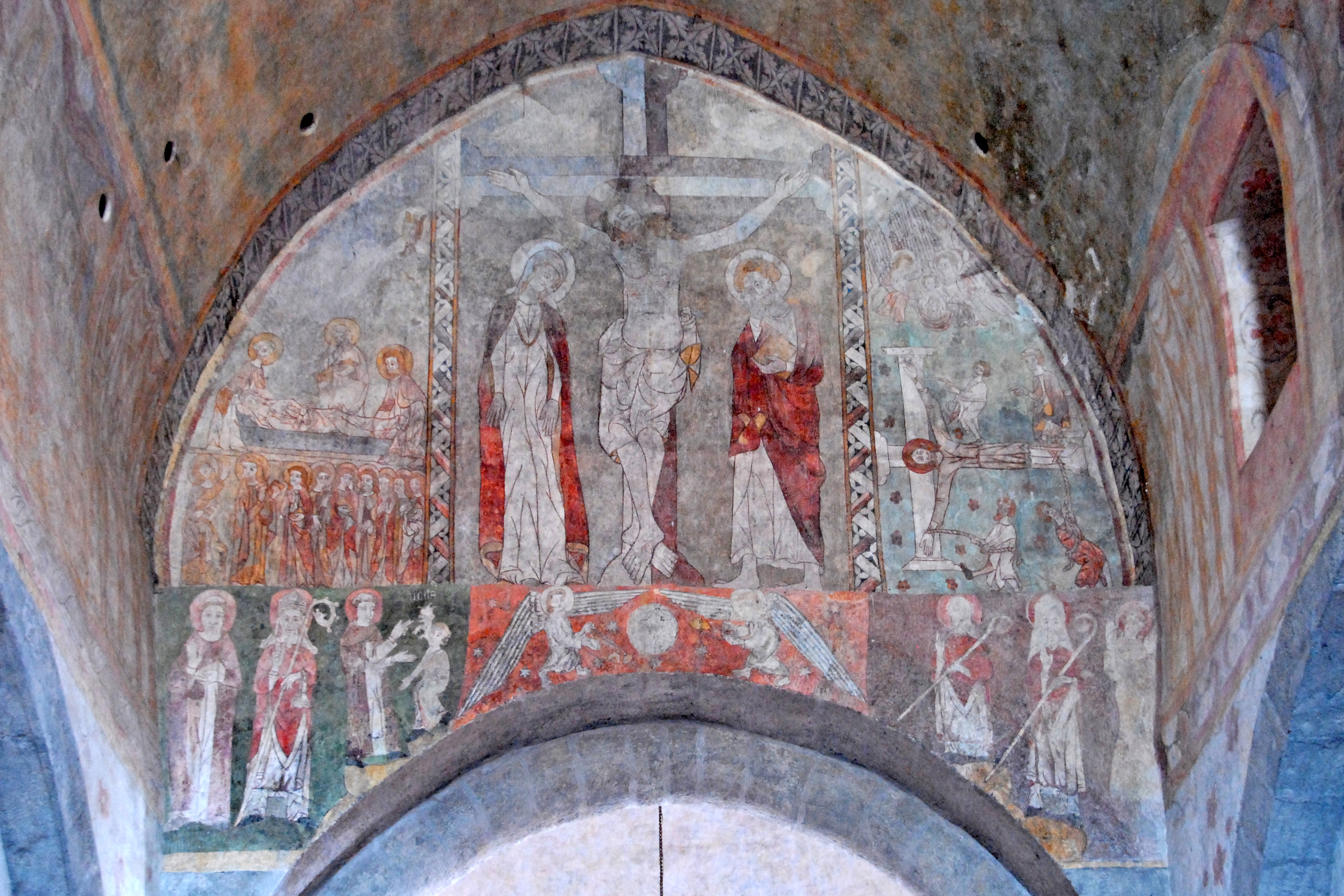 Kirche St.-André Lavaudieu, Fresko, Ostwand gesamt